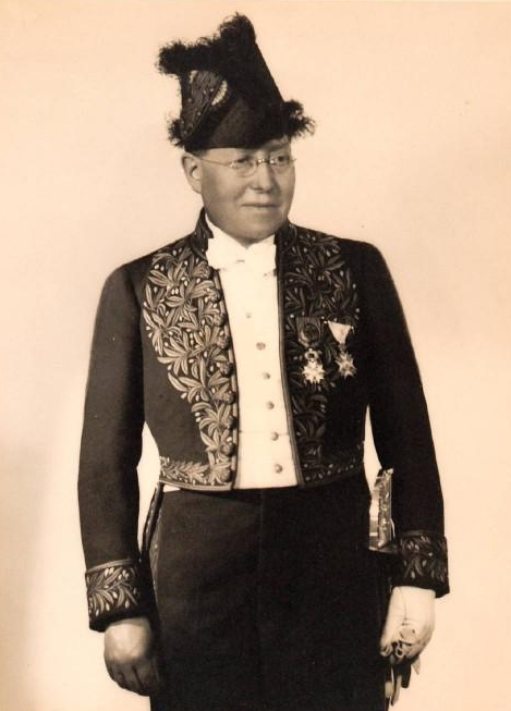 Le compositeur Henri Büsser (1872-1973) en tenue d'académicien en 1938.